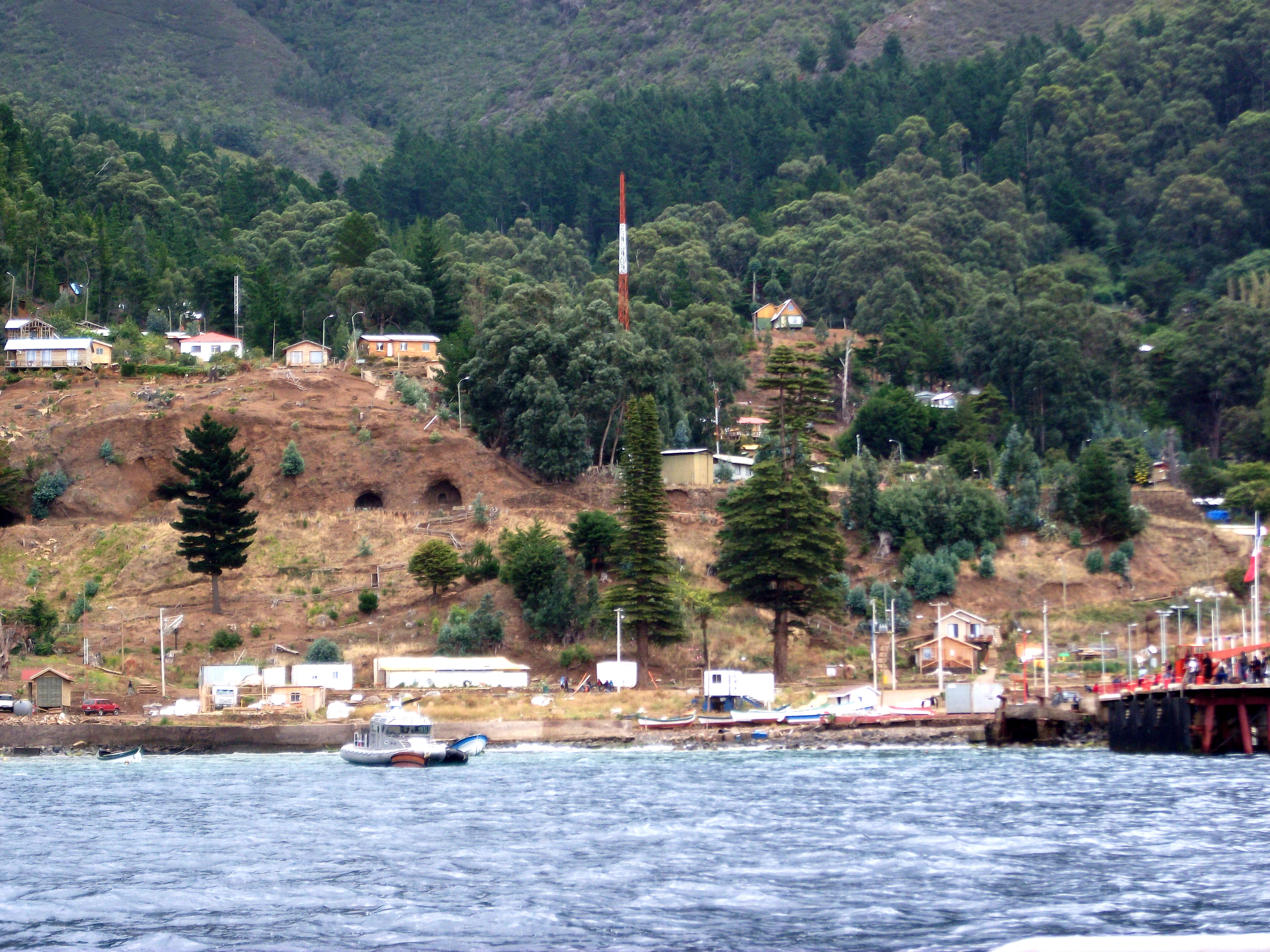 En aquella época el régimen penal resolvía que los delitos leves eran castigados con el rollo, y los graves en Juan Fernández. Así la isla se convirtió en la Bastilla de la América Española. Los presos se transportaban sólo con una camisa, una cotona, un pantalón y un jergón para dormir; al llegar, se les soltaba en la playa como fieras bravías.